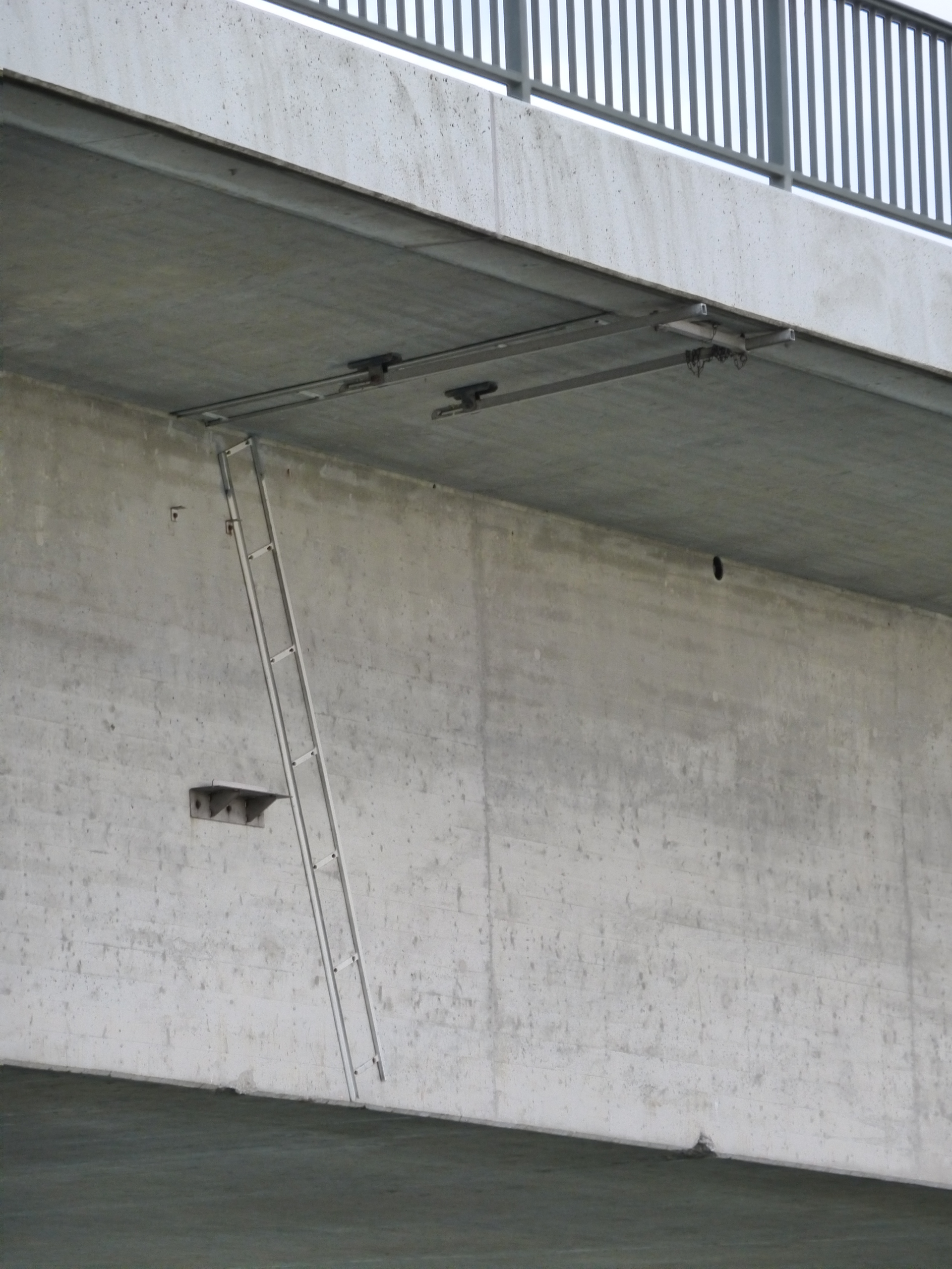 Halterungen zum Anbringen von Schneidladungen an der Straßenbrücke über den Donauseitenkanal bei der Stauanlage Bad Abbach - Poikam. Mit Hilfe dieser Vorrichtung hätte im Kriegsfall der Überbau der Brücke gesprengt werden können (Blick auf die Westseite der Brücke)